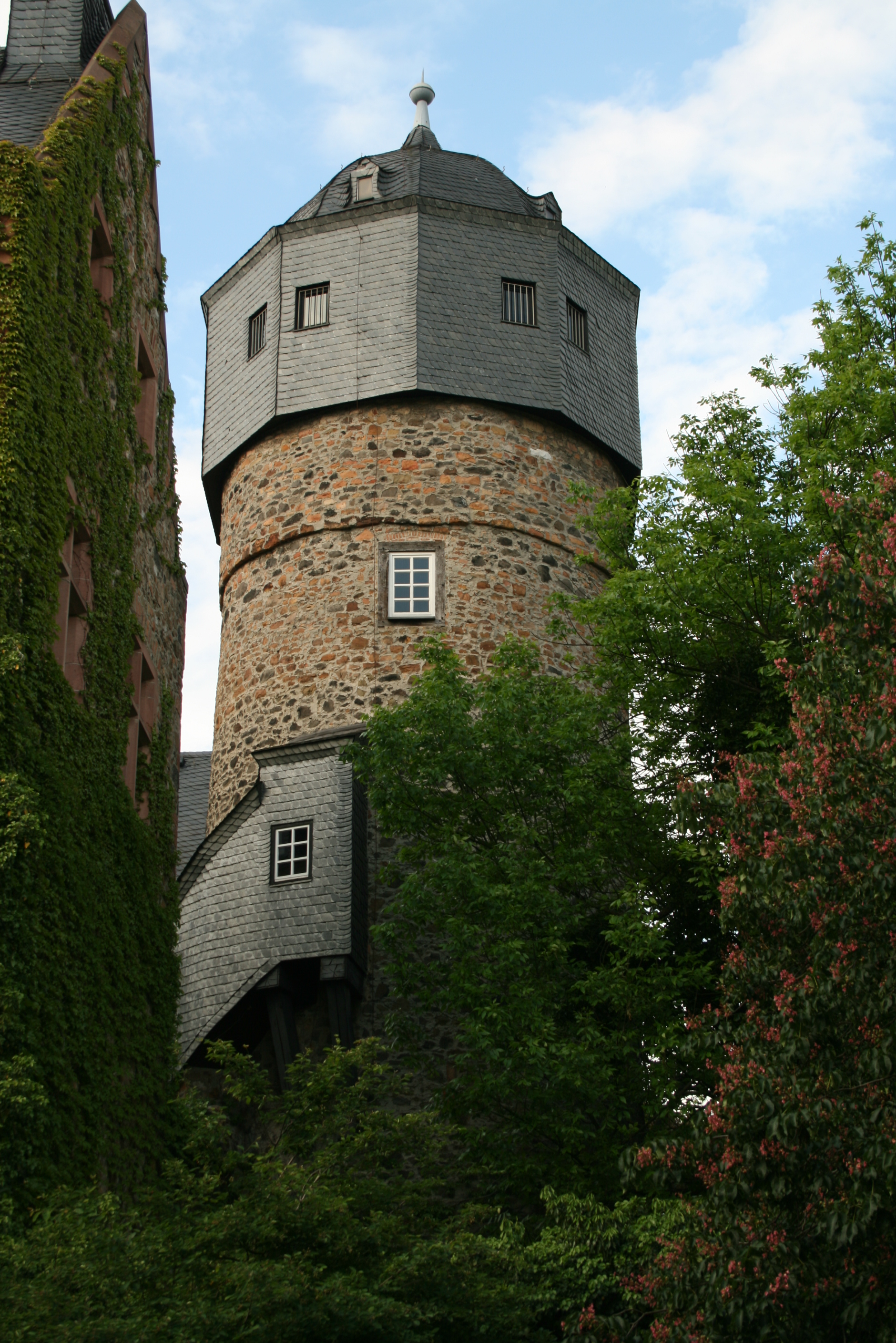 Turm des Alten Schlosses in Gießen/Tower of "Old Castle" in Giessen, Germany